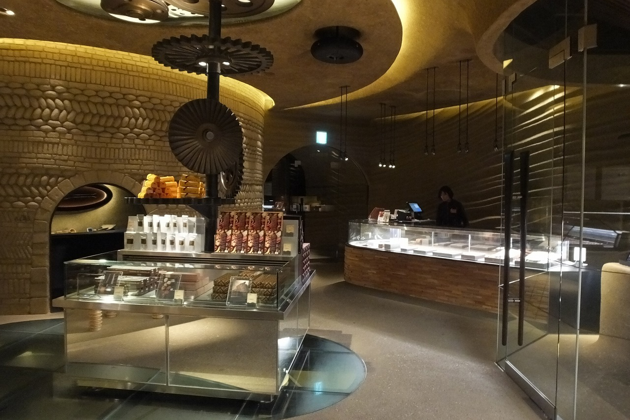 PATISSIER eS koyama - チョコレート専門店「ROZILLA」 パティシエ エス コヤマ 小山進